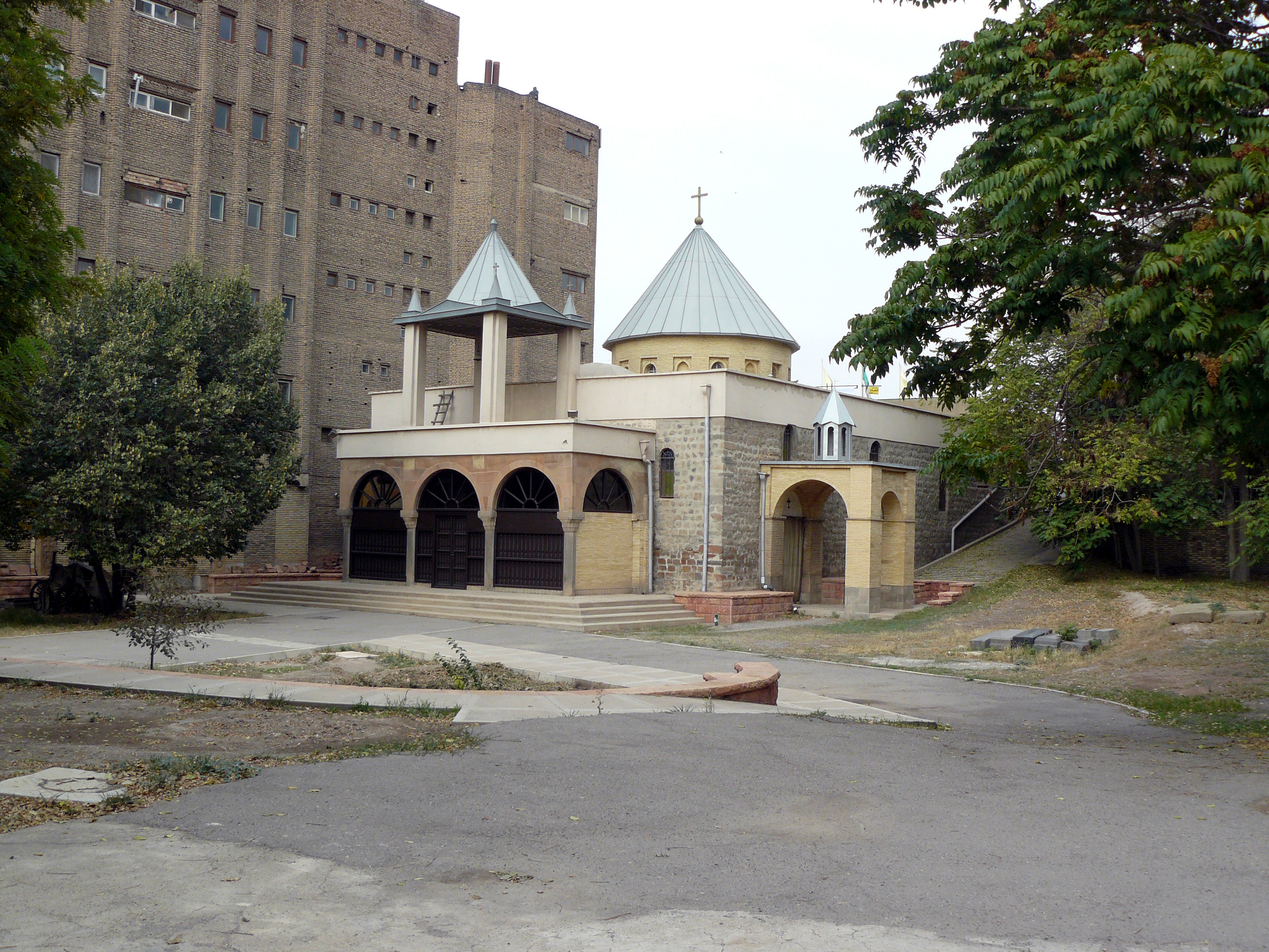 հայկական եկեղեցի Թավրիզում